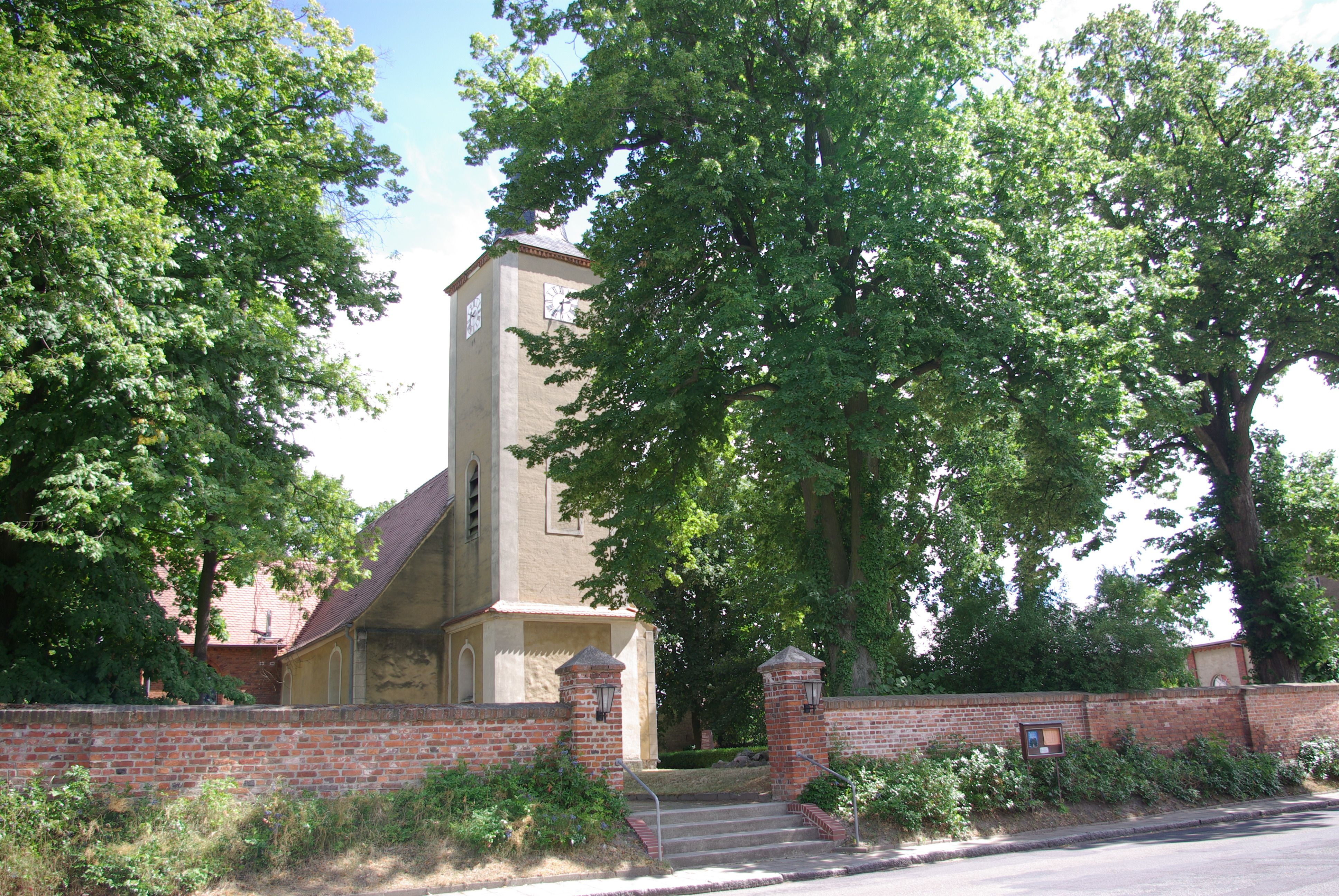 Nennhasuen in Brandenburg. Die Kirche in Nennhausen steht unter Denkmalschutz.